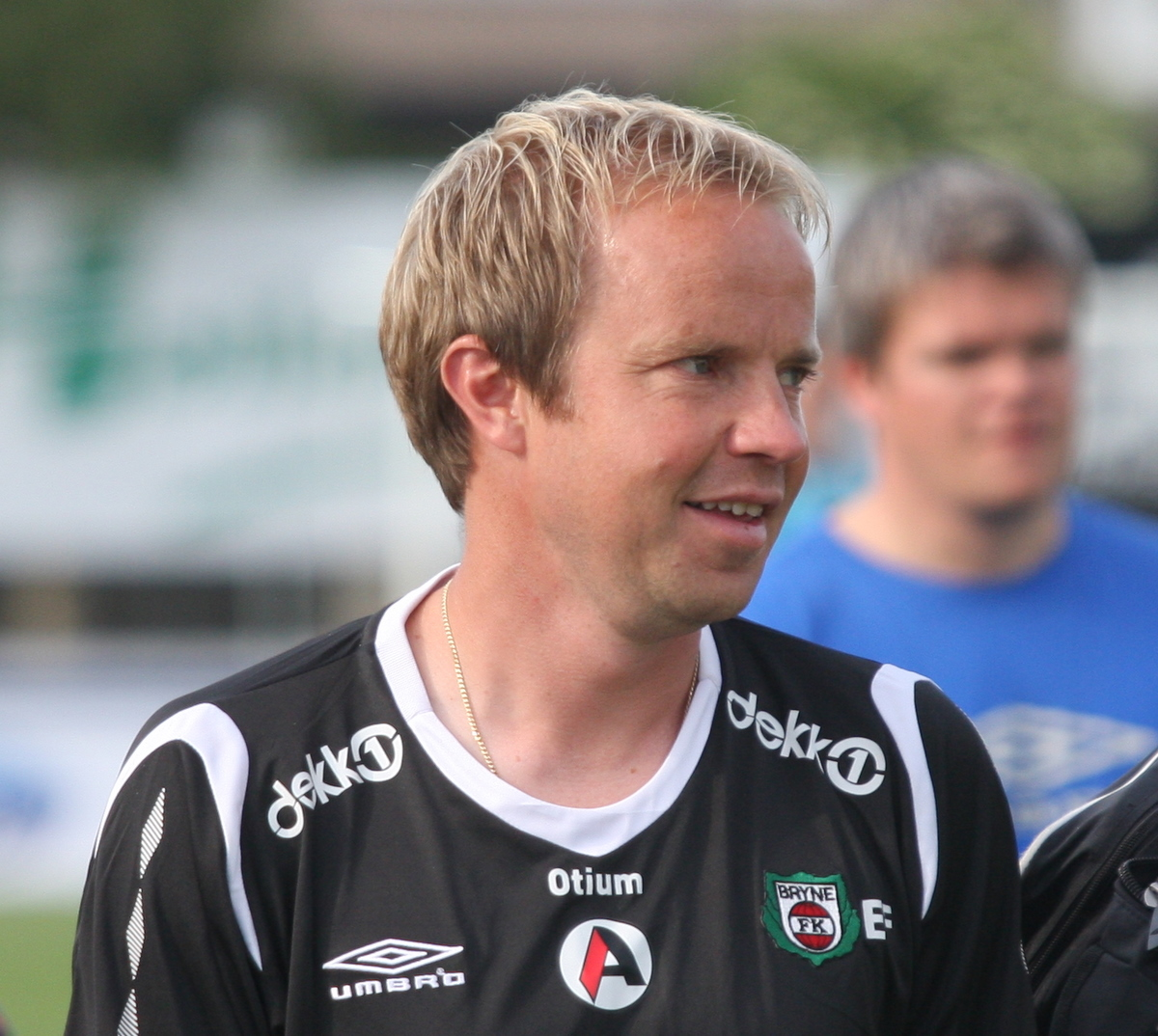 Erik Fuglestad